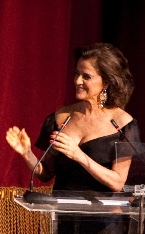 A atriz Marieta Severo em 2010, na reinauguração do Teatro Municipal do Rio de Janeiro © Pedro França